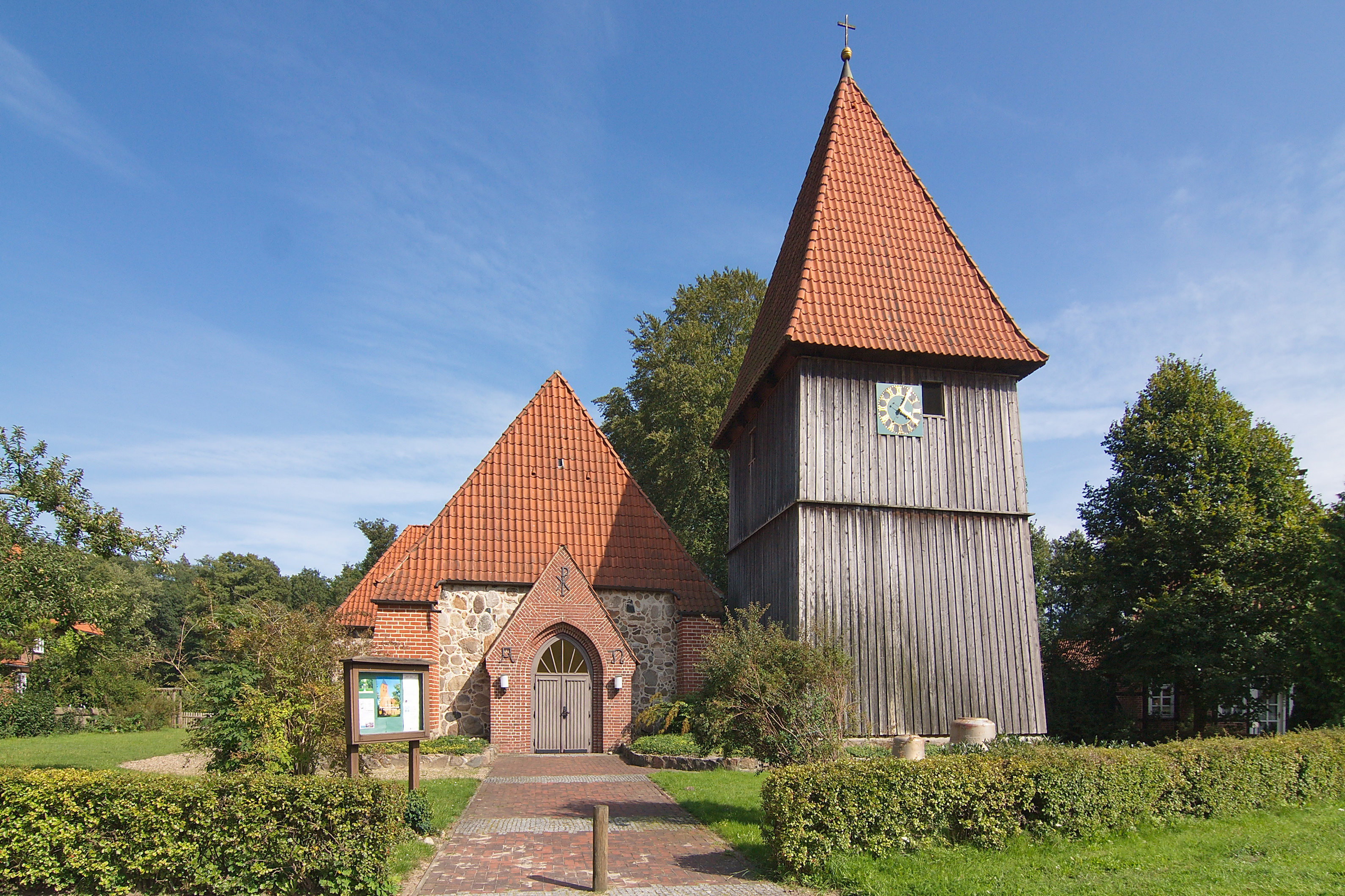 St. Georgs-Kirche (Steinhorst) in Niedersachsen, Deutschland